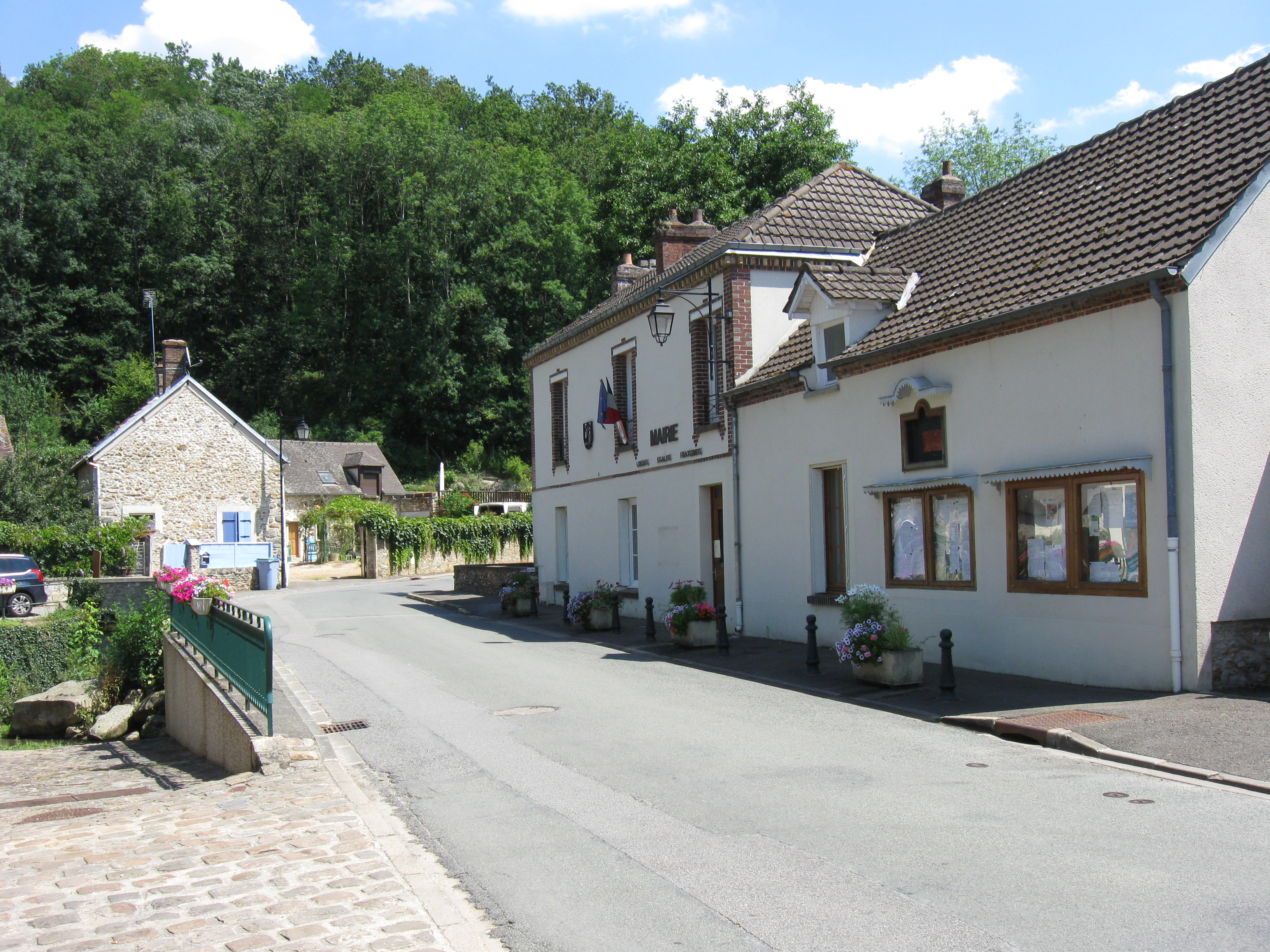 Mairie de Droue-sur-Drouette (Département d'Eure-et-Loir, région Centre).